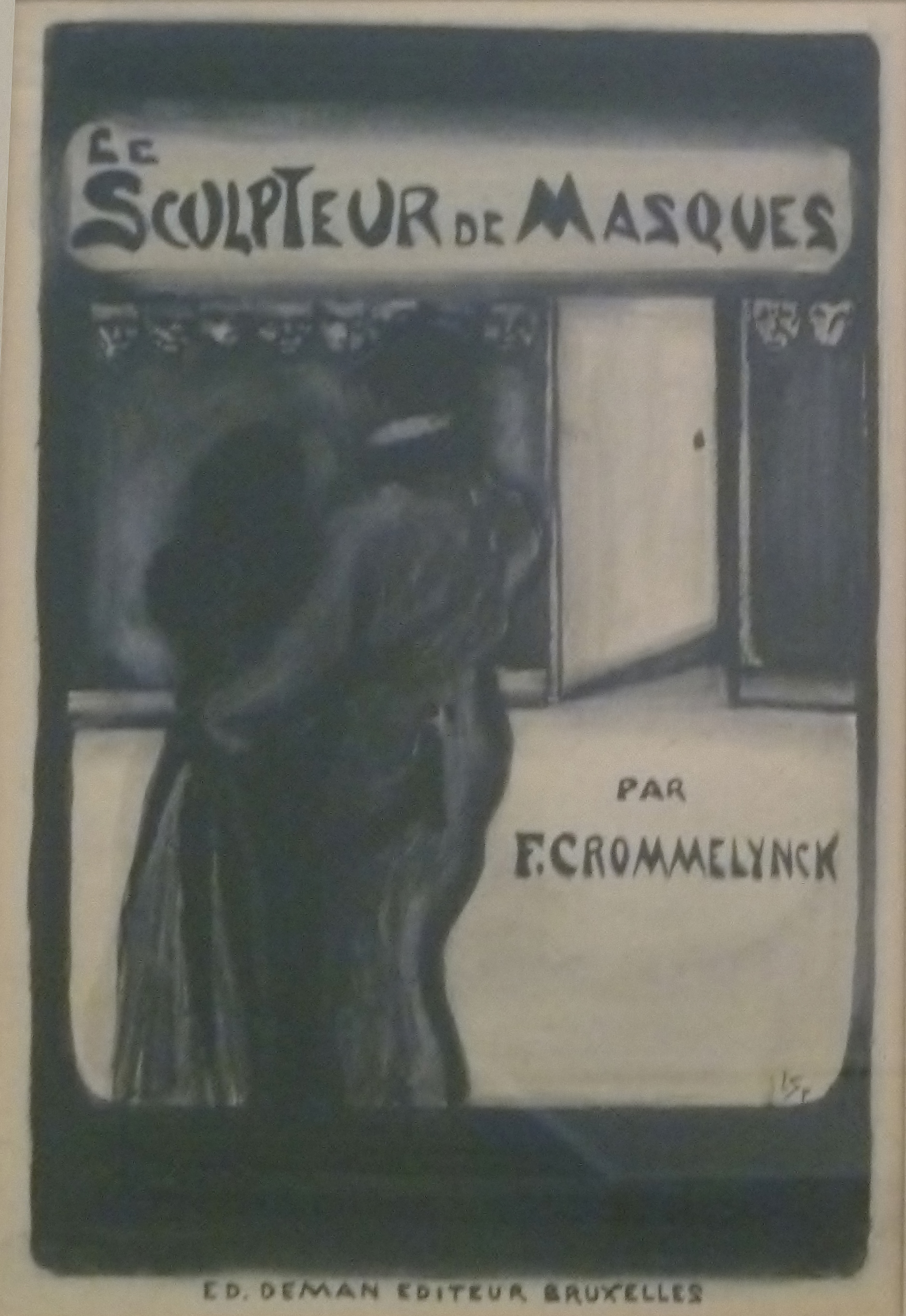 "Le Sculpteur de Masques" (1907) door Fernand Crommelynck; illustratie en ontwerp voor omslag door Léon Spilliaert (1907); Oost-Indische inkt, potlood, aquarel, pen op papier; Museum van Elsene